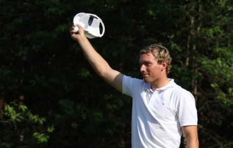 Floris de Vries wint het Nationaal Open op de Rosendaelsche Goldclub op 1 juni 2008